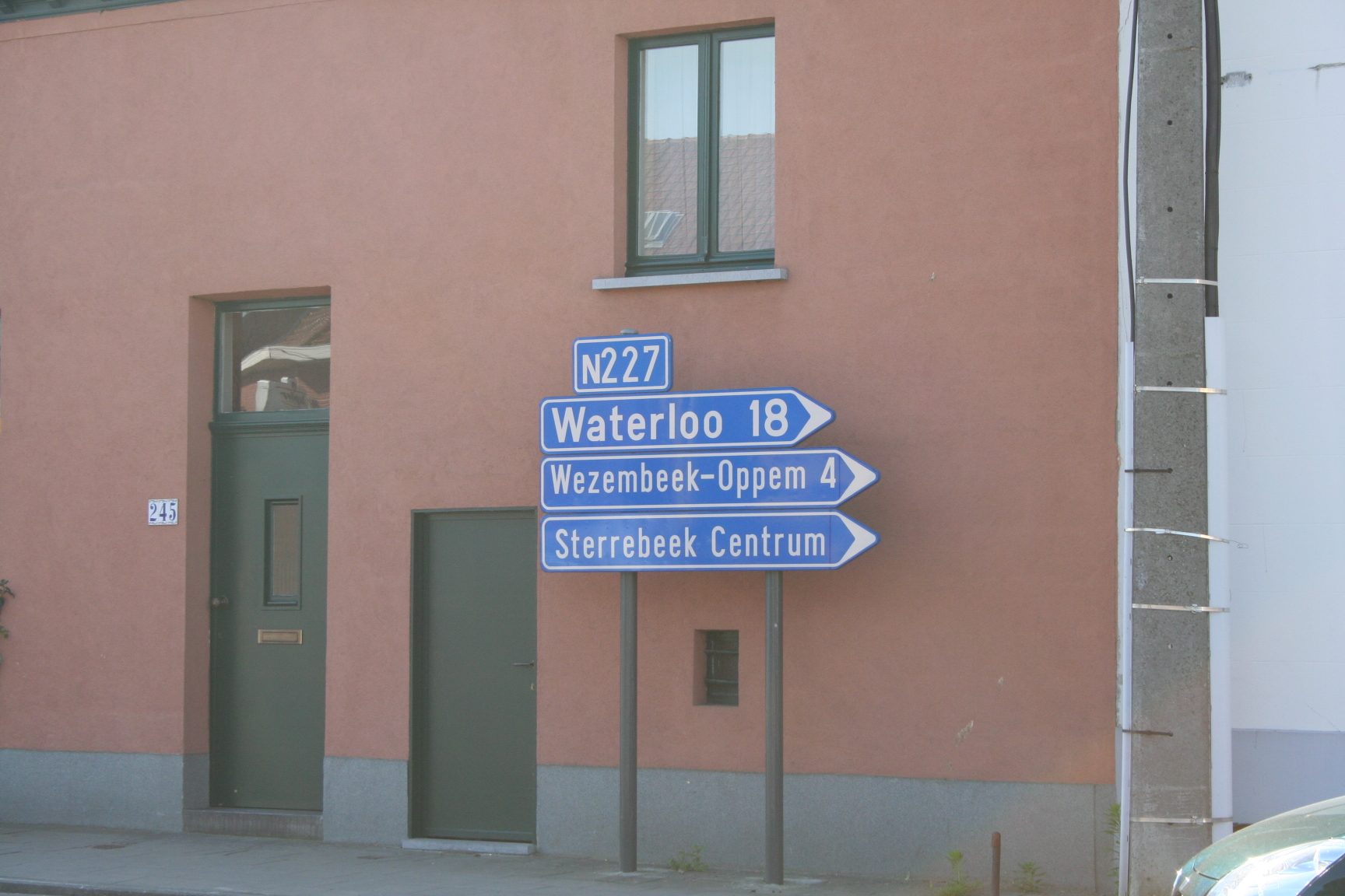 Photo d'un panneau de la N227 à Sterrebeek